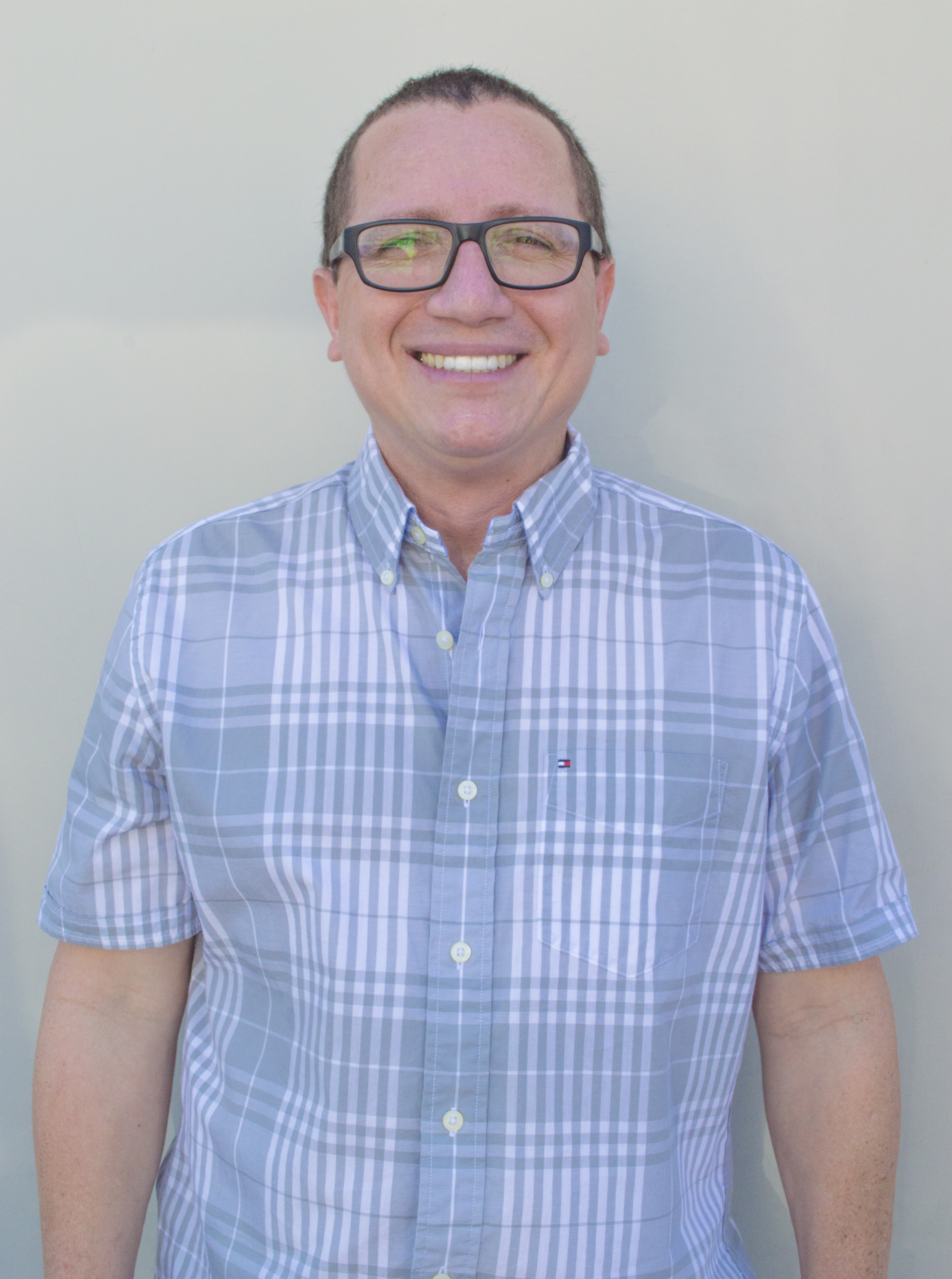 Tomás Delgado en 2015